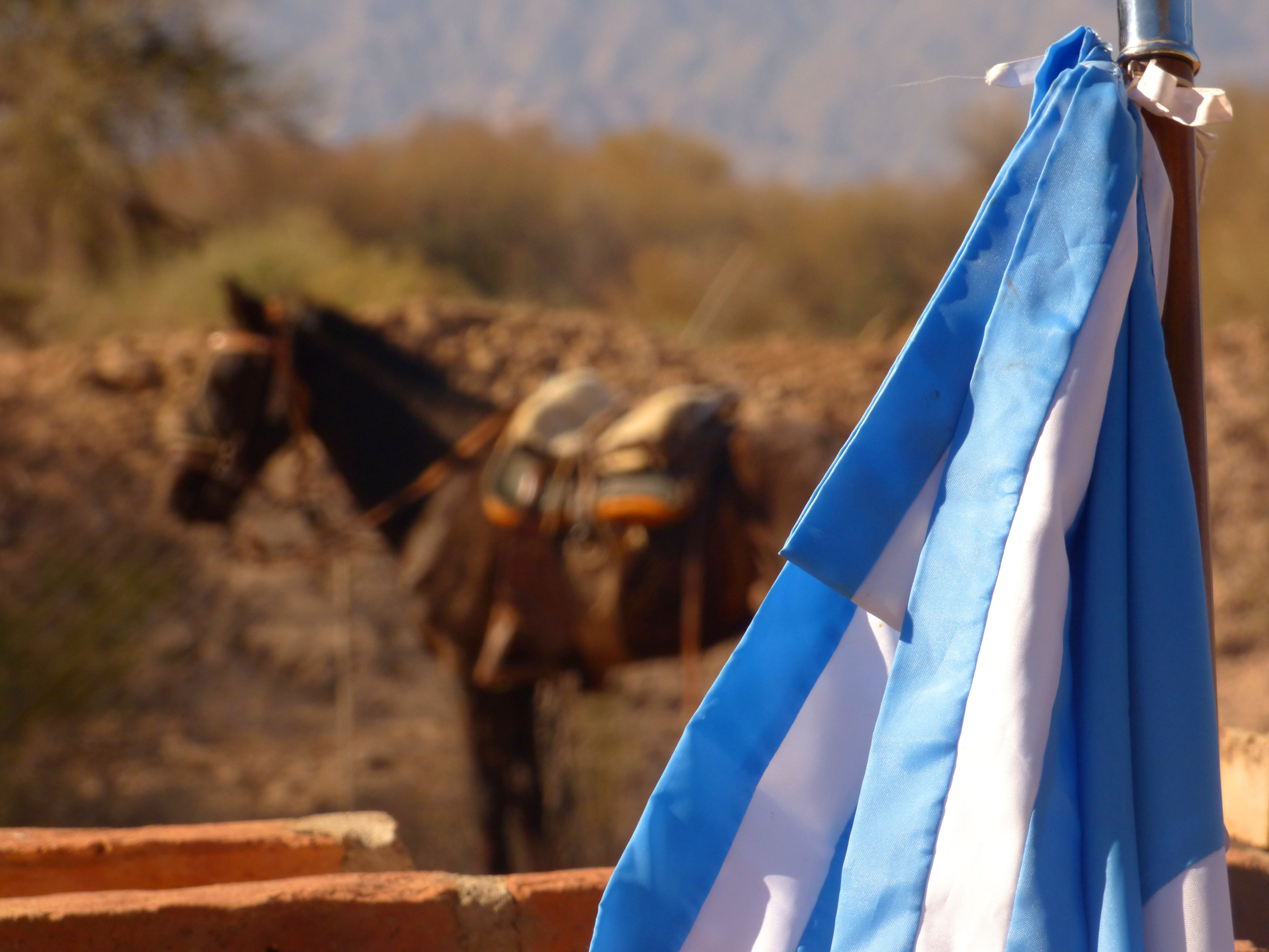 Un grupo de personas del campo que trabajaba a caballo decidieron reunirse y formar una agrupación gaucha, con pocas personas comenzó, hasta que fueron sumando más integrantes hoy en día esta agrupación teniendo bien presente los símbolos patrios como lo es nuestra bandera, llevan a delante esta hermosa tradición del hombre a caballo en cada evento patrio que de celebra en diferentes puntos de la provincia de la Rioja.